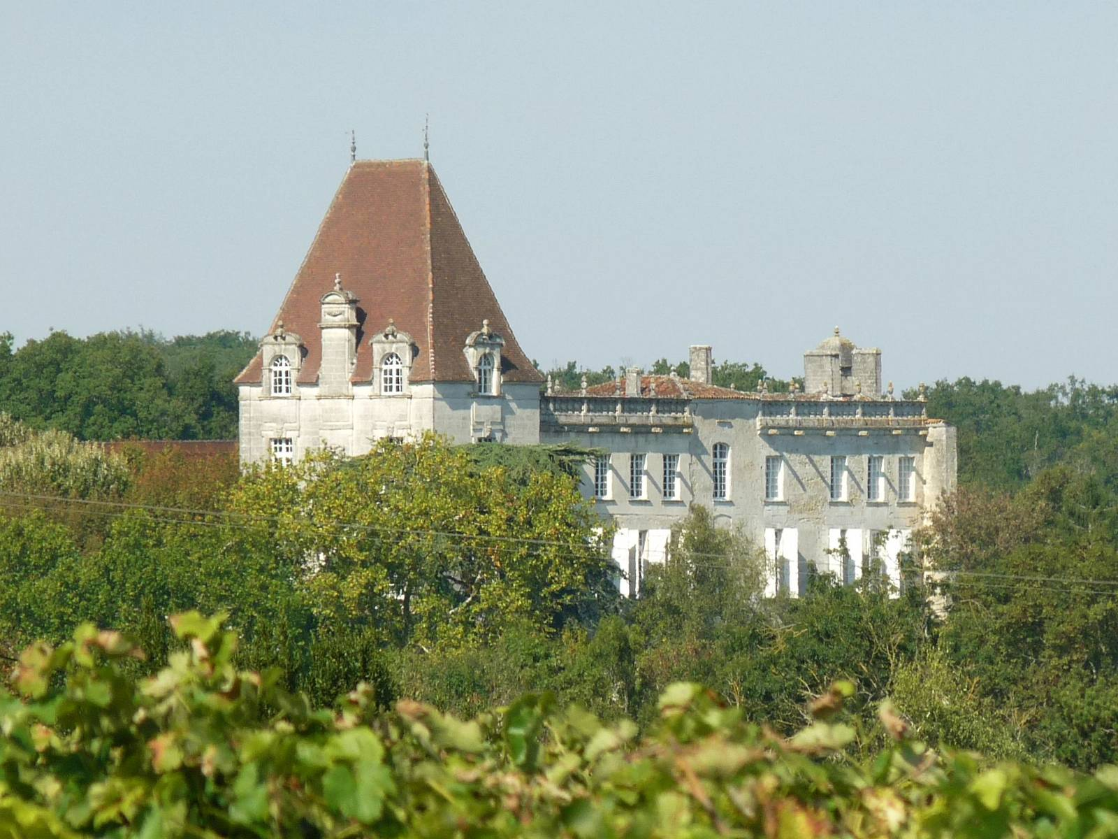 château de Bourg-Charente (16), France